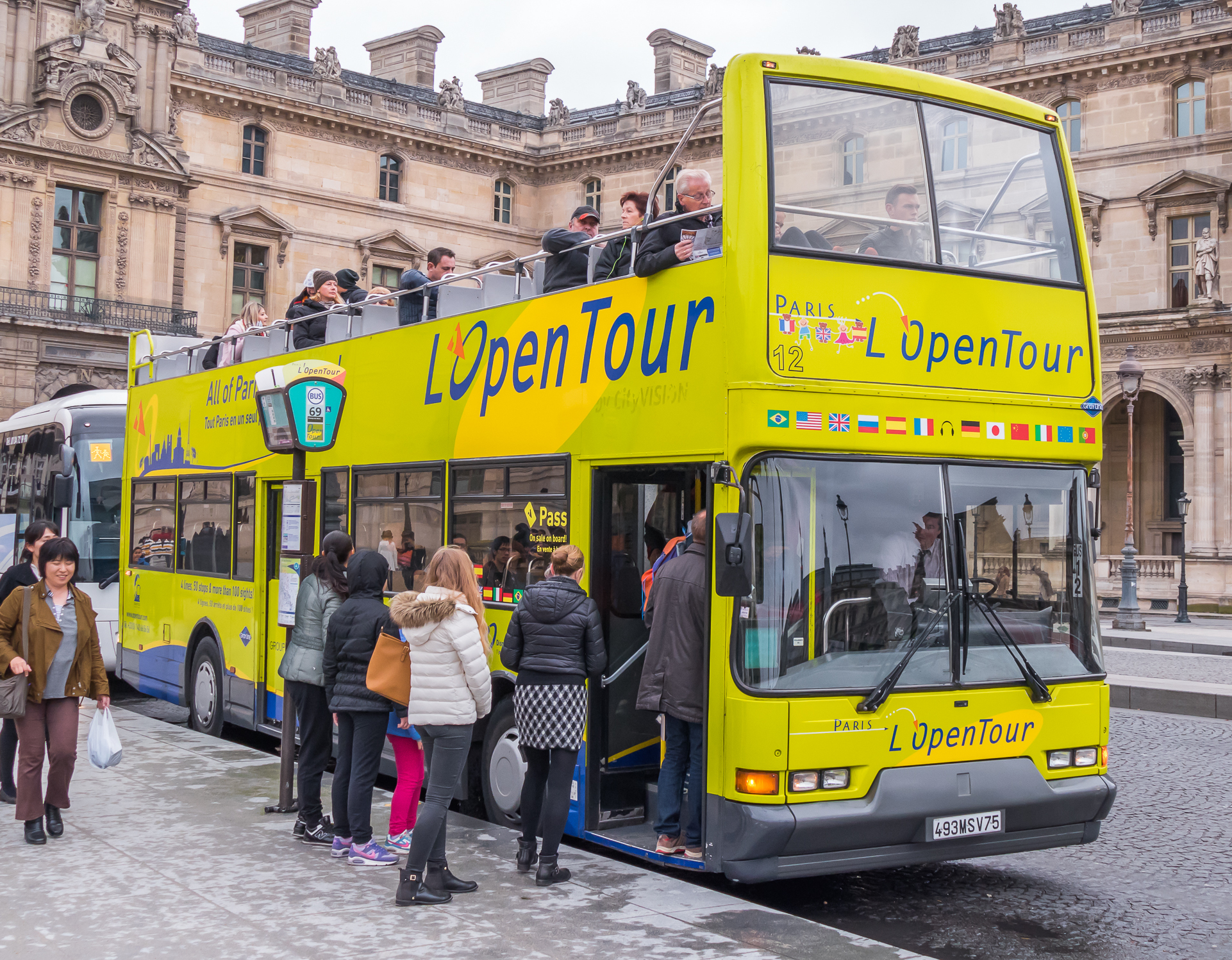 Volvo B10M 12 SELT, navette verte, Paris Bus transport in Paris and Île-de-France.